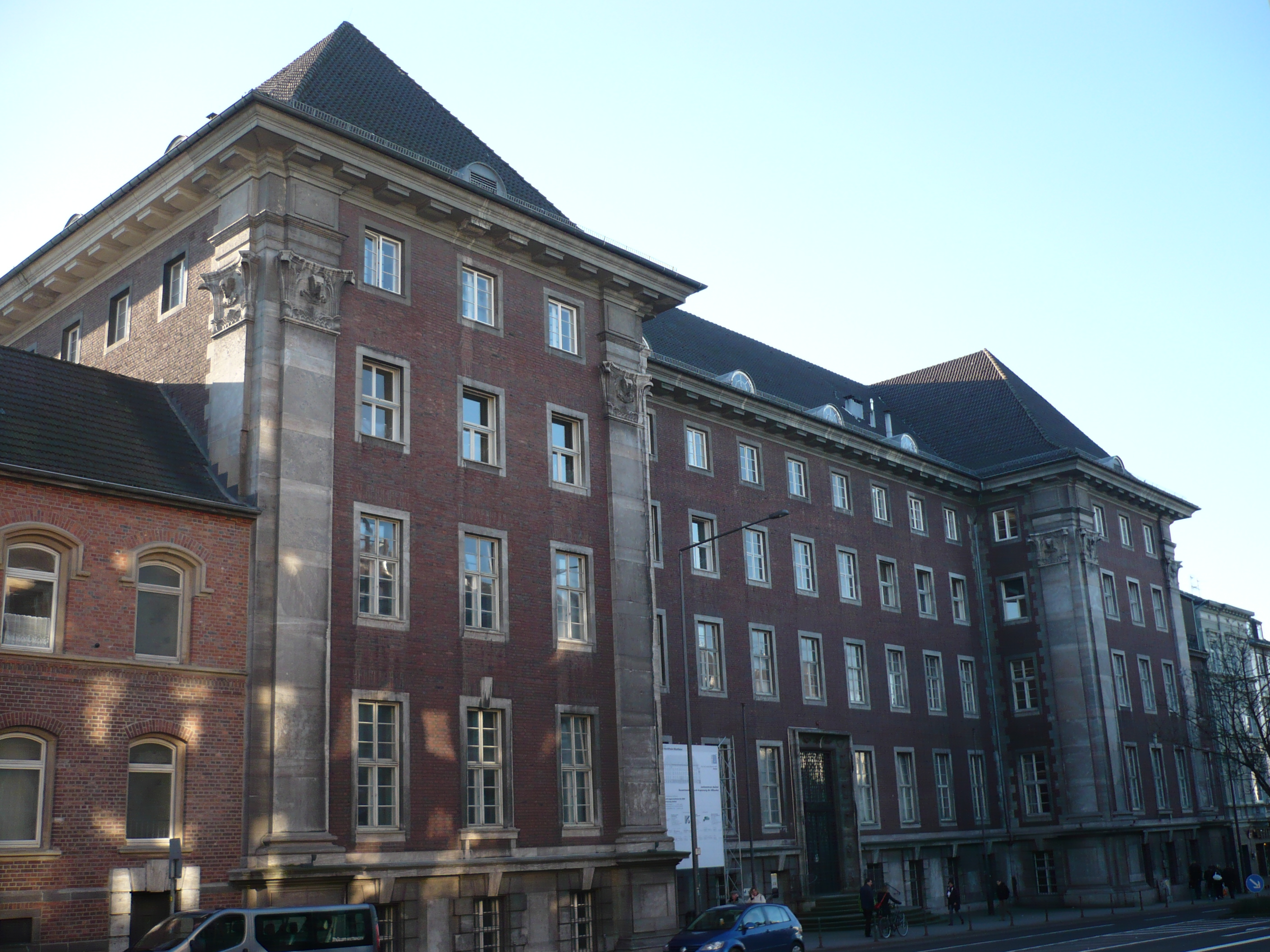 Erster Erweiterungsbau des Amts- und Landgerichts Aachen am Adalbertsteinweg